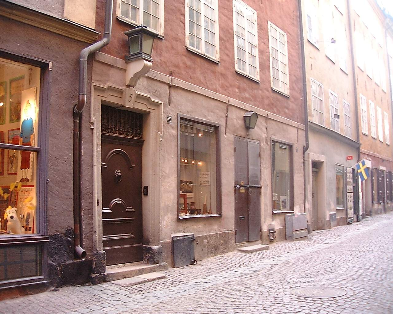 5, Köpmangatan (Cepheus 15), Gamla stan, Stockholm.